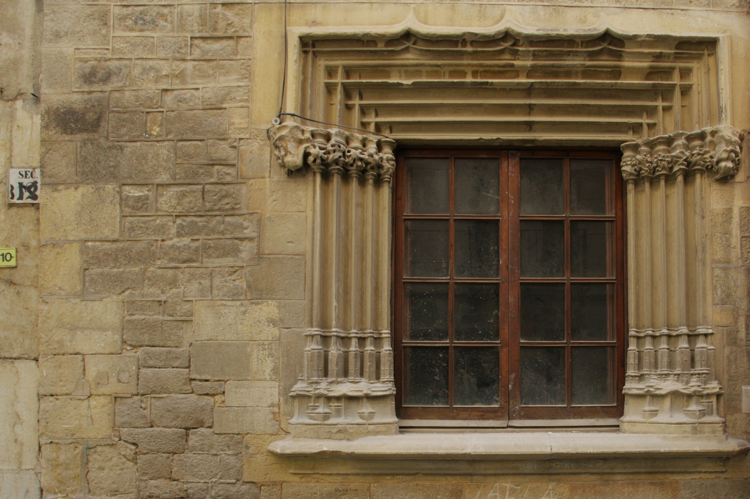 Palau Despuig (Tortosa) Object location40° 48′ 47.86″ N, 0° 31′ 19.28″ E